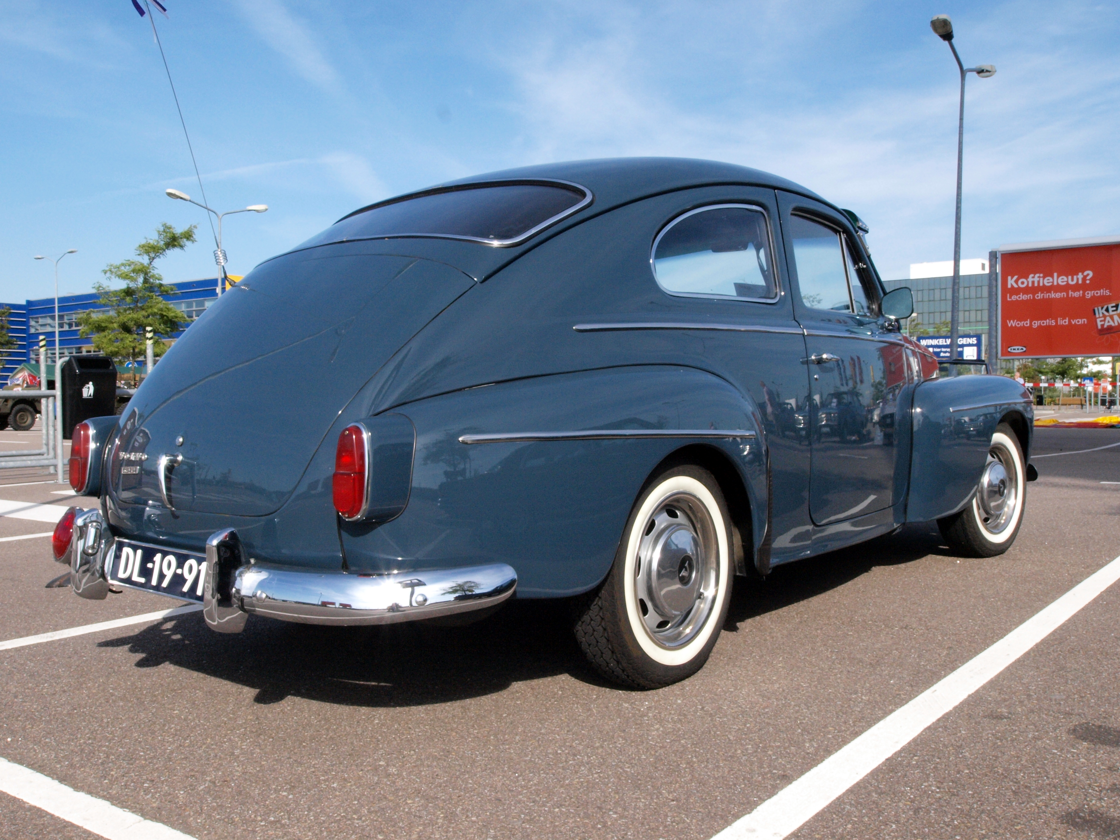 Volvo P 544 DL-19-91